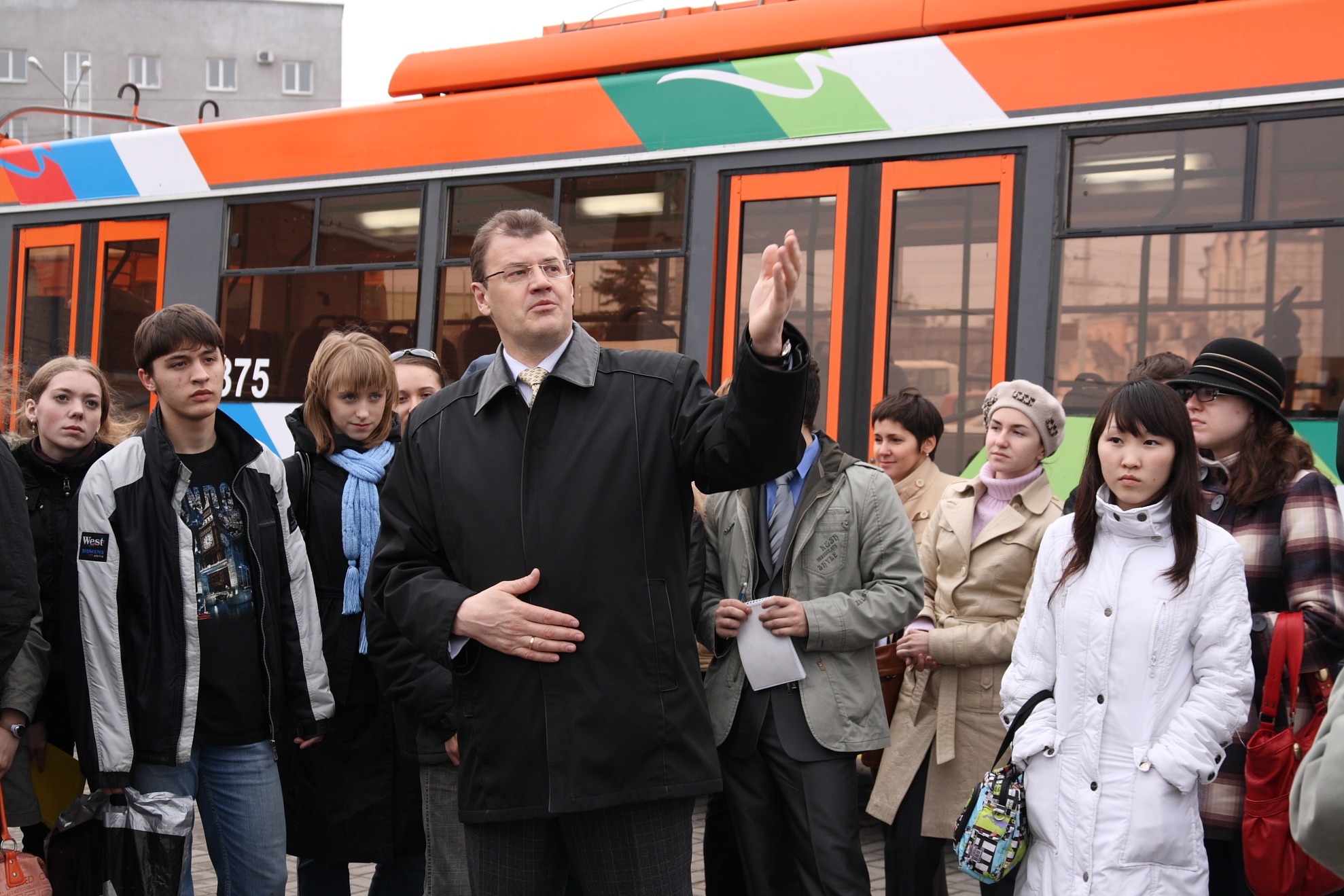 Николайчук - экскурсовод